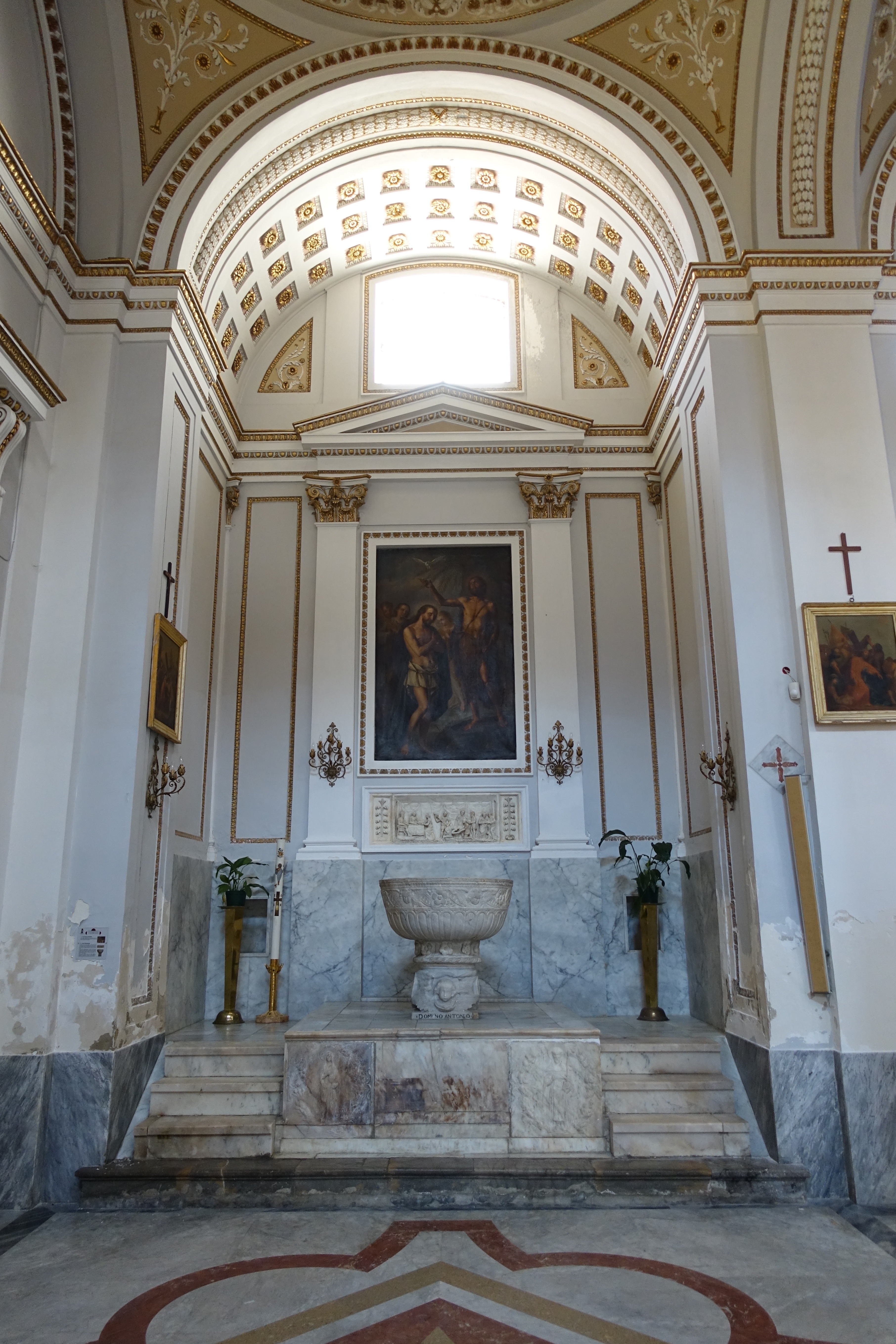 Gauche